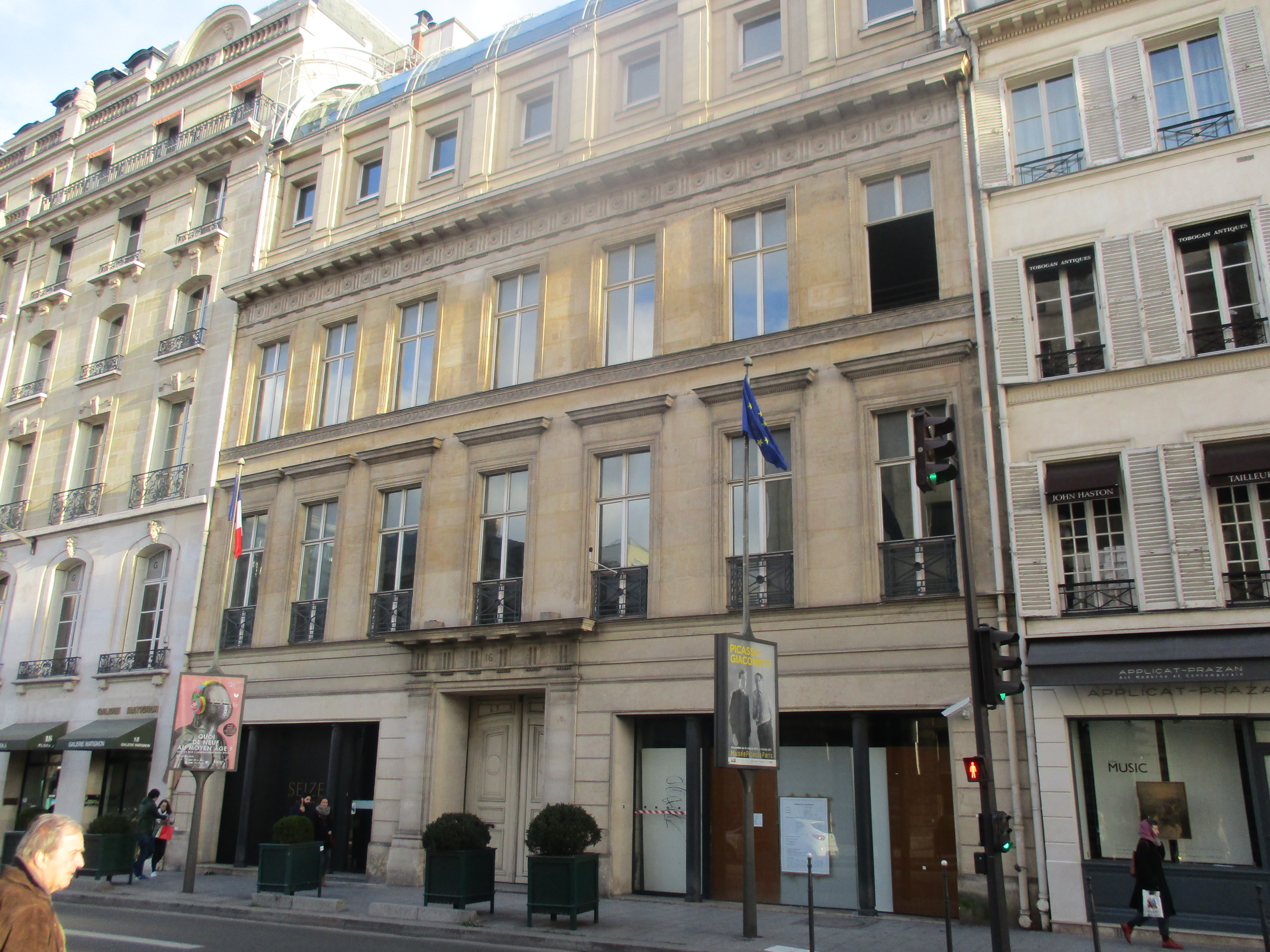 16 avenue Matignon, Paris VIIIe.